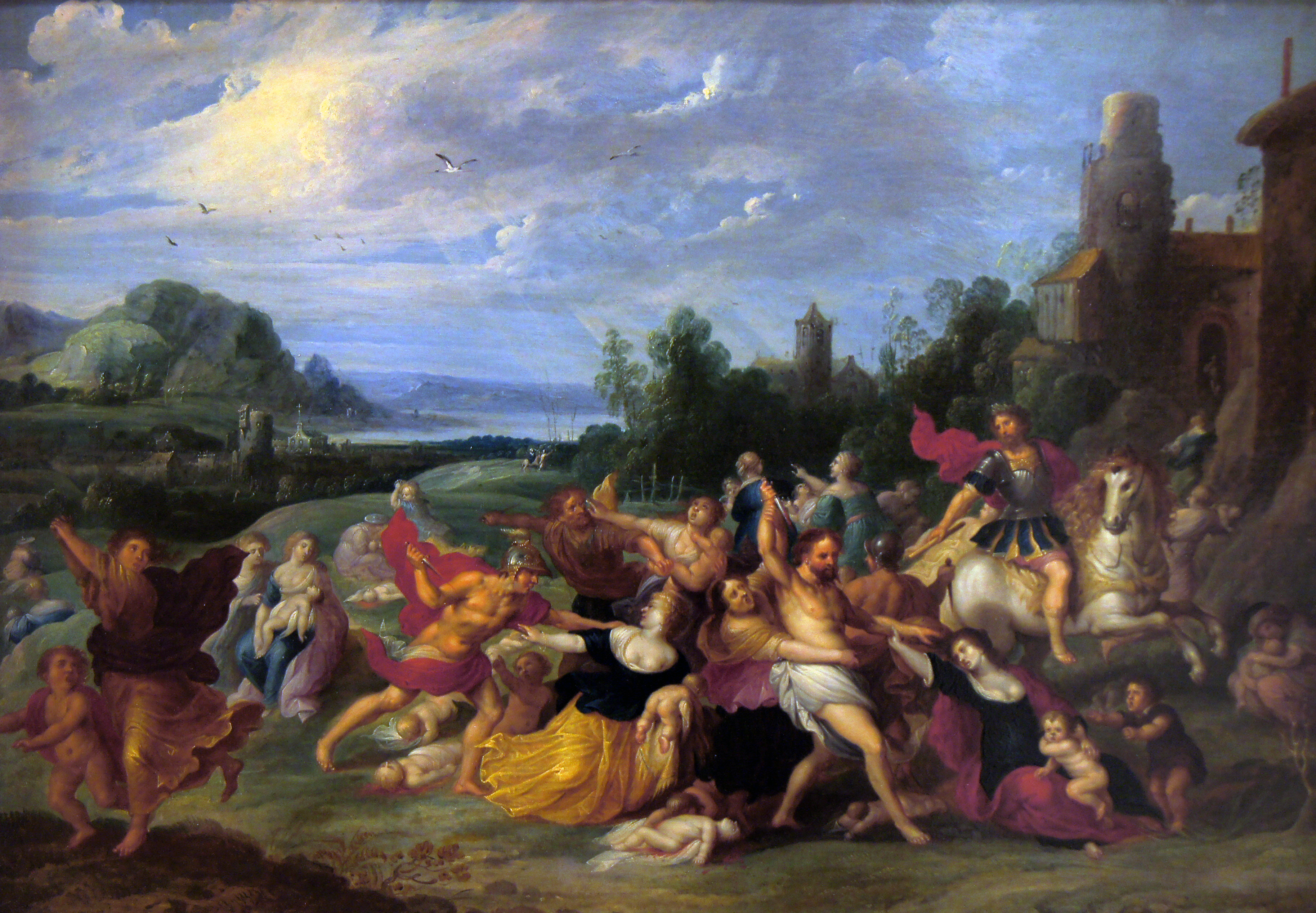 Der bethelmitische Kindermordlabel QS:Lde,"Der bethelmitische Kindermord"